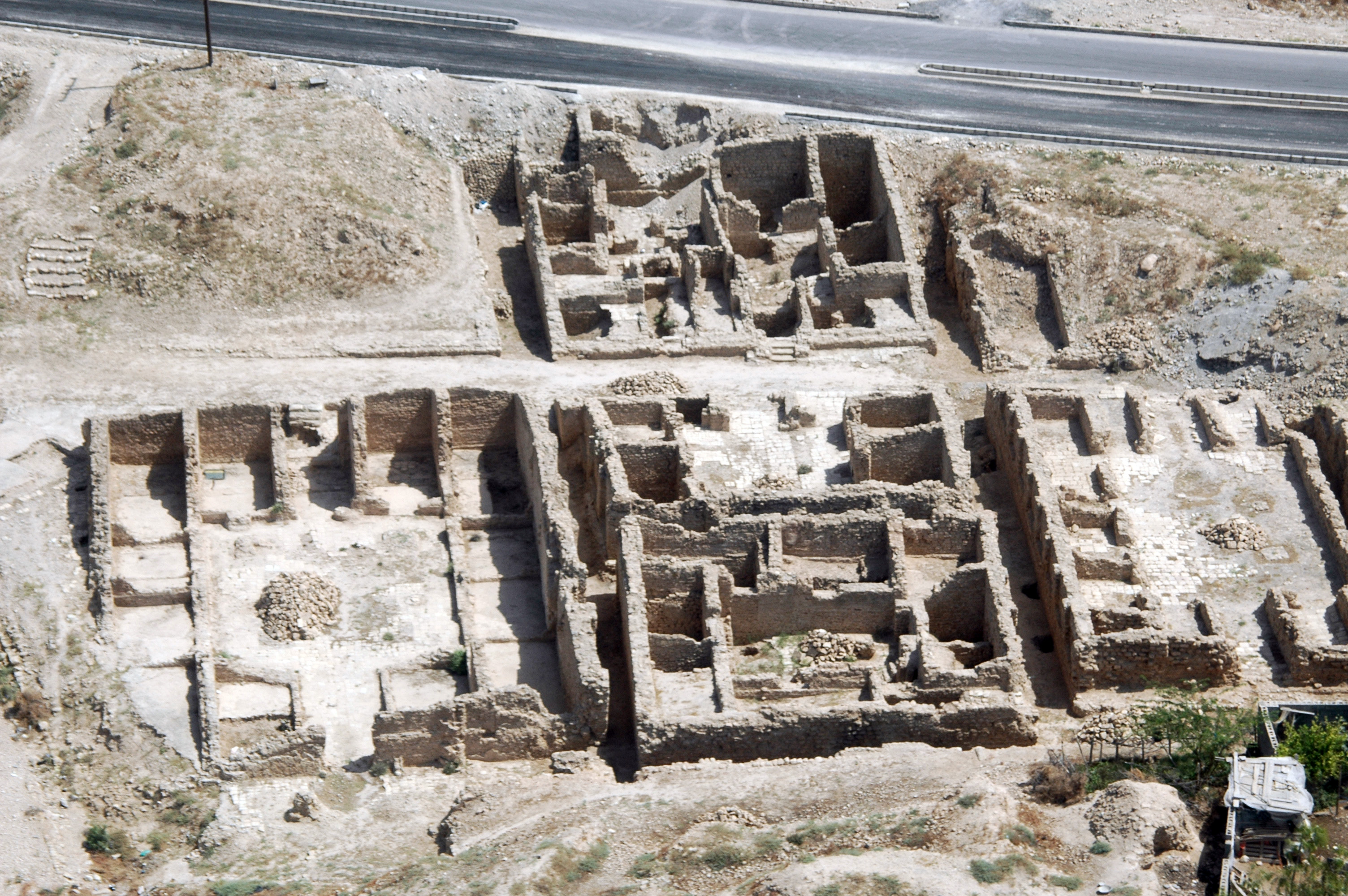 قورخانه شهر طاهری